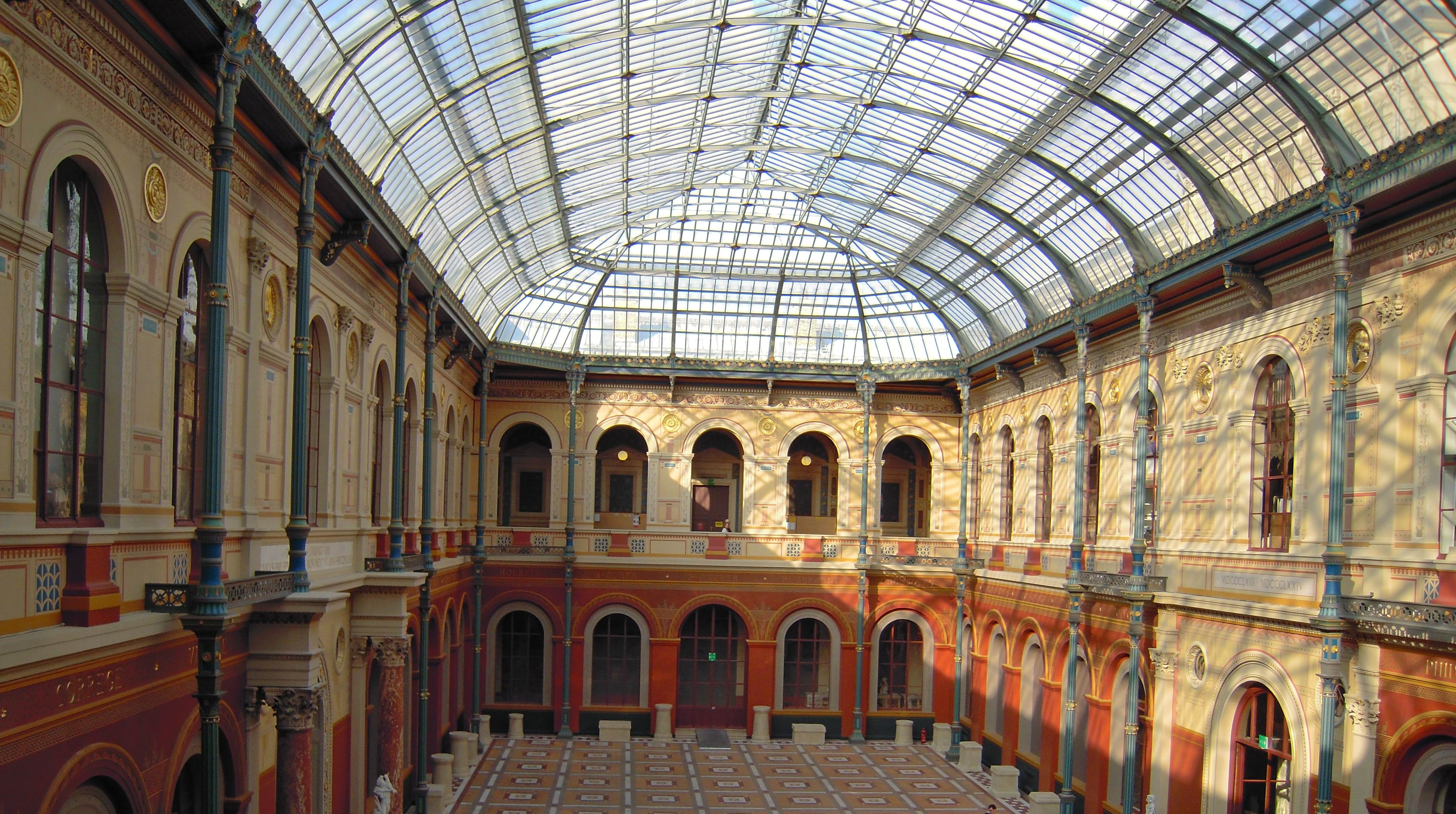 Cour vitrée de l'École Nationale des Beaux Arts - Félix Duban architecte